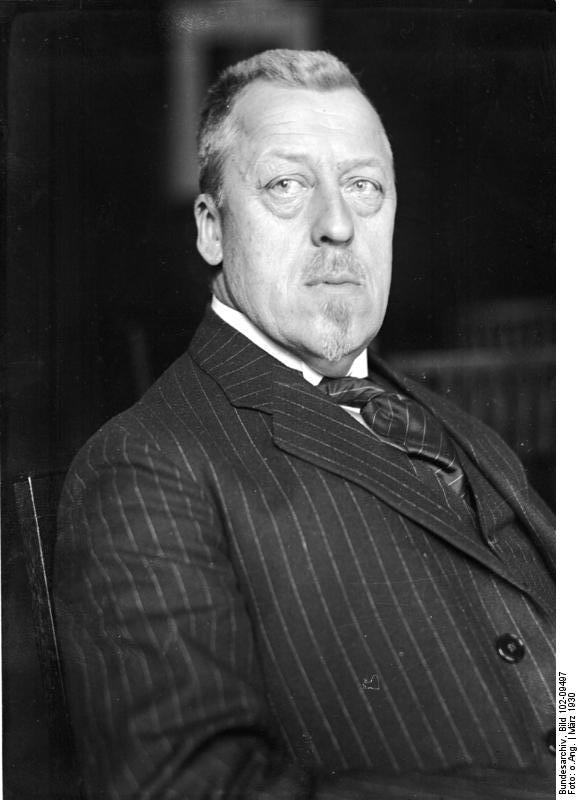 Dr. Hugo Eckener, wurde von der amerikanischen geologischen Nationalgesellschaft die goldene Ehren-Medaille überreicht. Die Medaille ist bisher in 42 Jahren nur 11 mal verliehen worden.